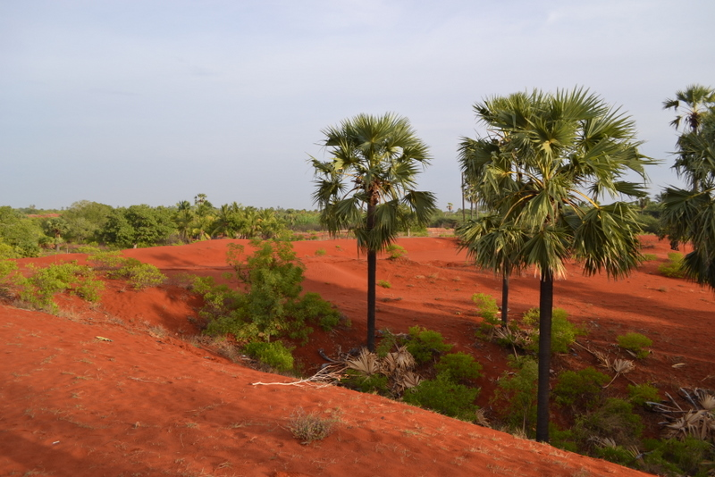 திசையன்விளைக்கருகே தேரிக்காட்டில்